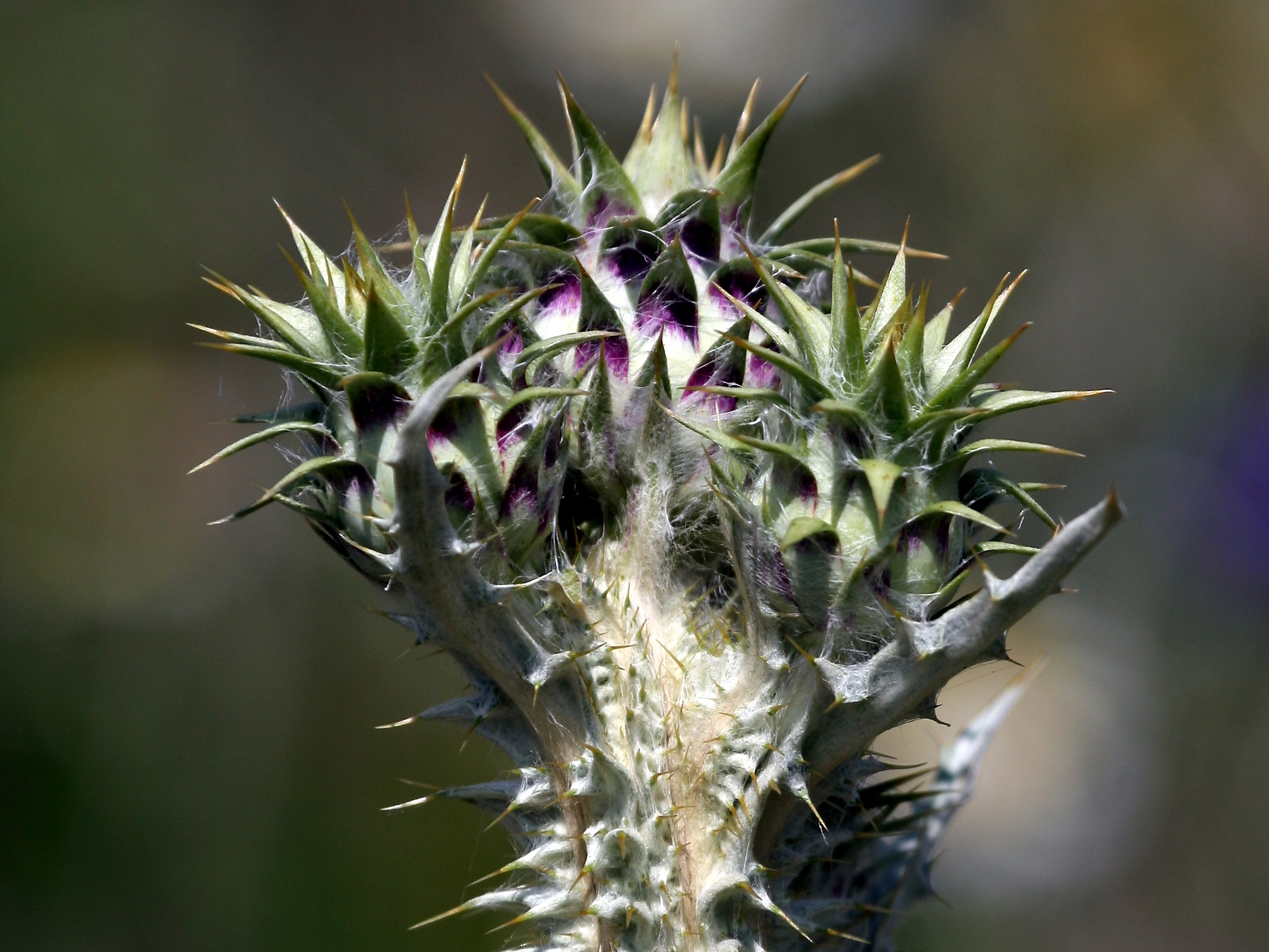 Onopordum illyricum - Pre floración - Prado de Rejas, cerca de las pistas de Madrid-Barajas (España)